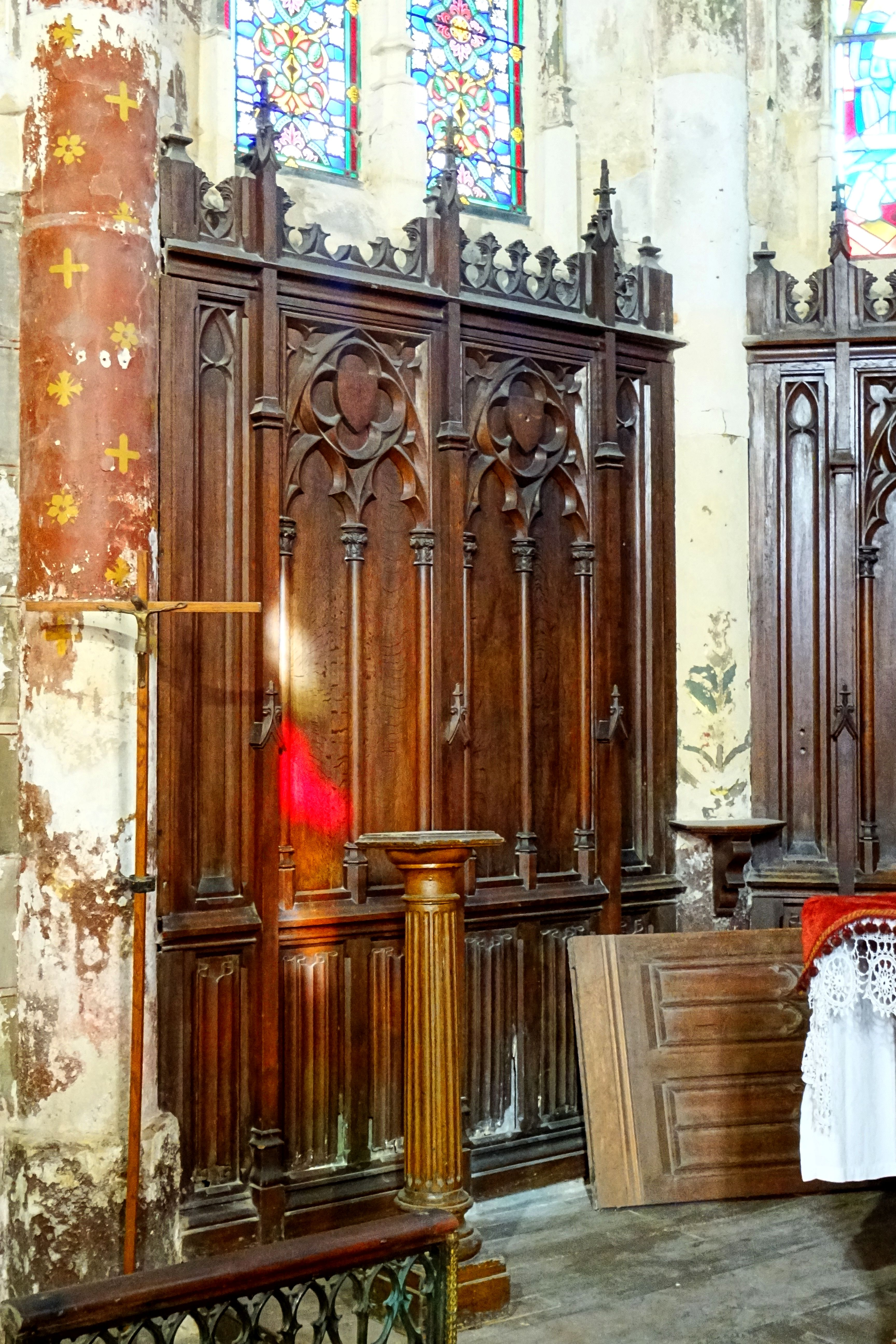 Chœur, 3e travée (abside), boiseries néo-gothiques, par Poussièlgue-Rusand, 1876. Le curé a versé un acompte de 500 francs à la commande et un solde de 1 745 francs à la réception.